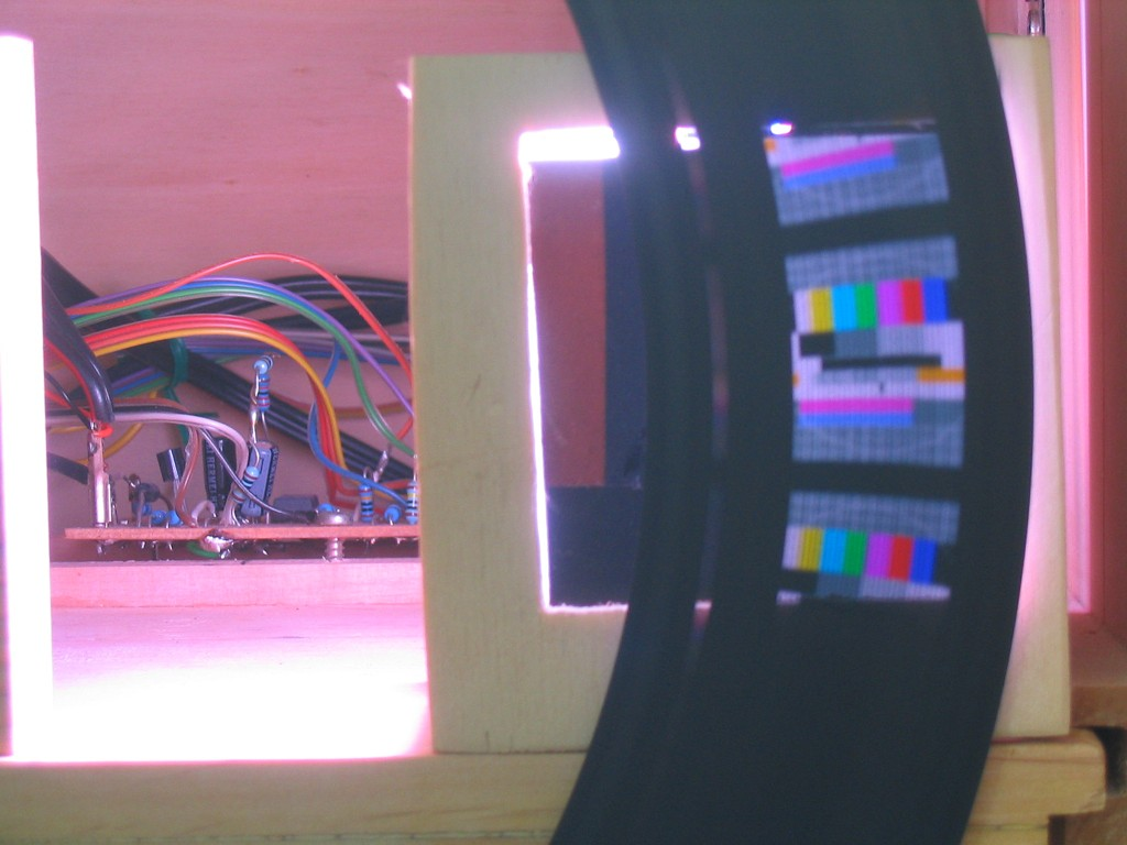 Farbtestbild mit der Nipkowscheibe wiedergegeben, 32 Zeilen vertikal